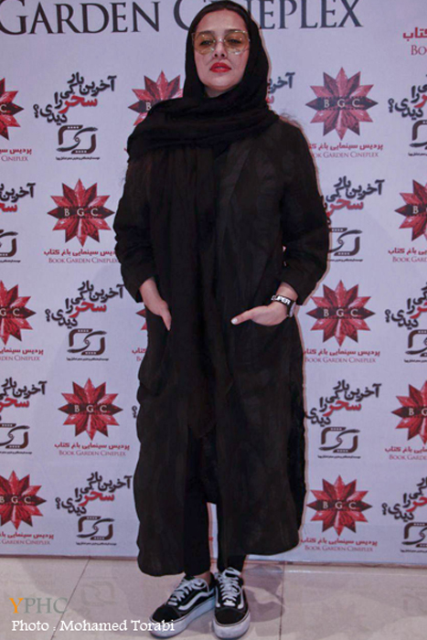 آناهیتا درگاهی در اکران خصوصی فیلم سینمایی «آخرین بار کی سحر را دیدی؟»